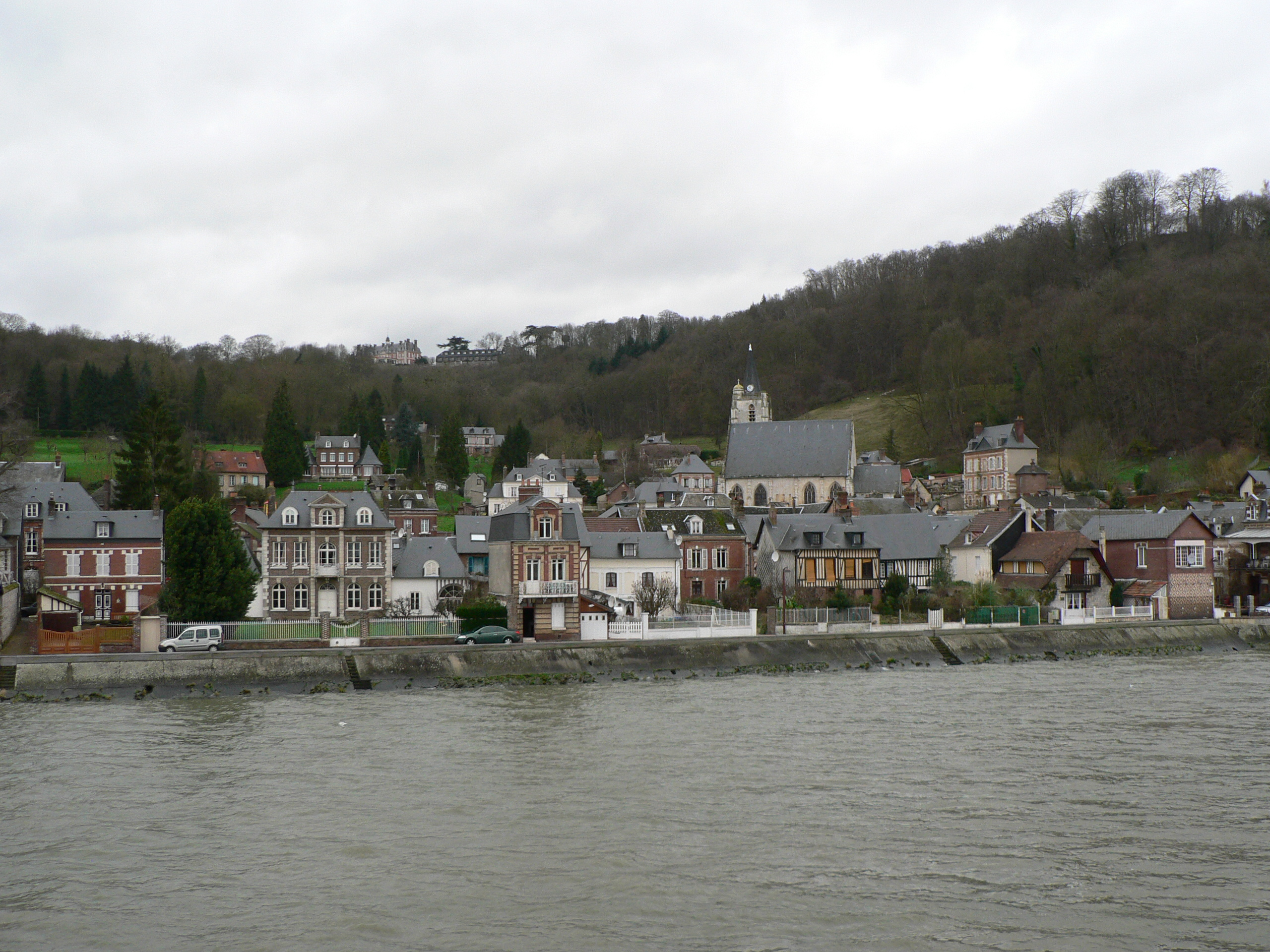 Villequier